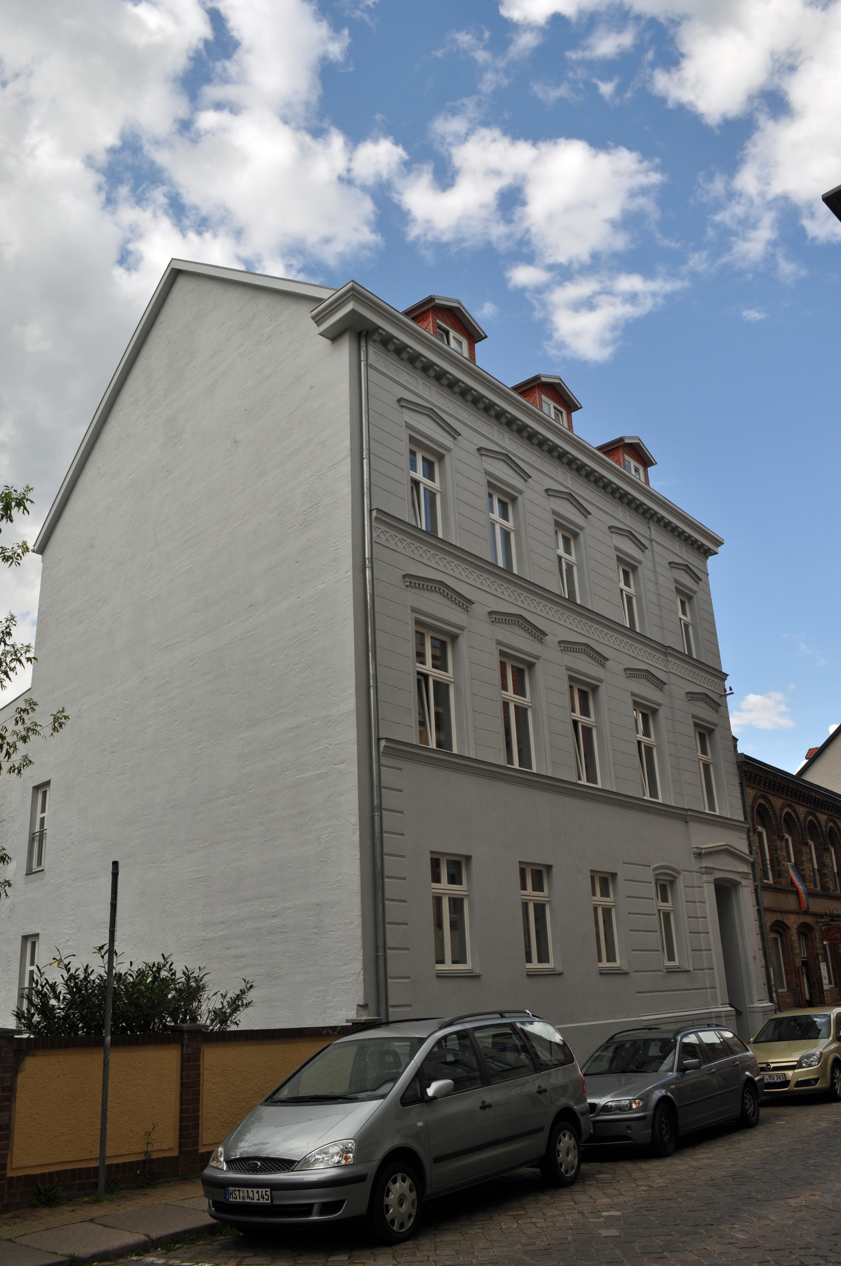 Das Foto zeigt ein Haus (bzw. Details des Hauses) in der Frankenstraße in Stralsund, Deutschland. Die Hausnummer steht im Dateinamen. Aufgenommen am 19. Juli 2011 vom Benutzer:Klugschnacker.